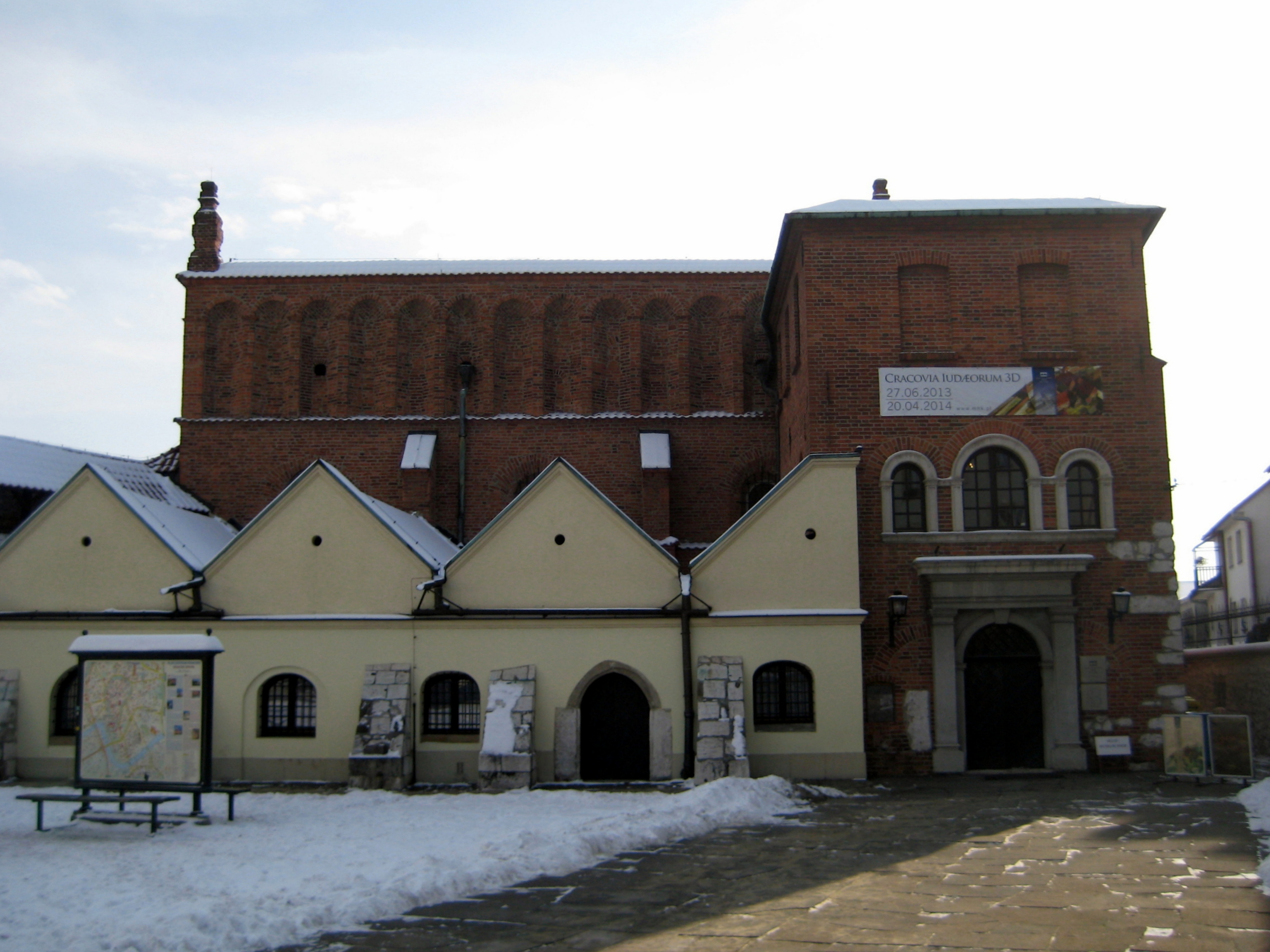 Vecchia Sinagoga di Cracovia